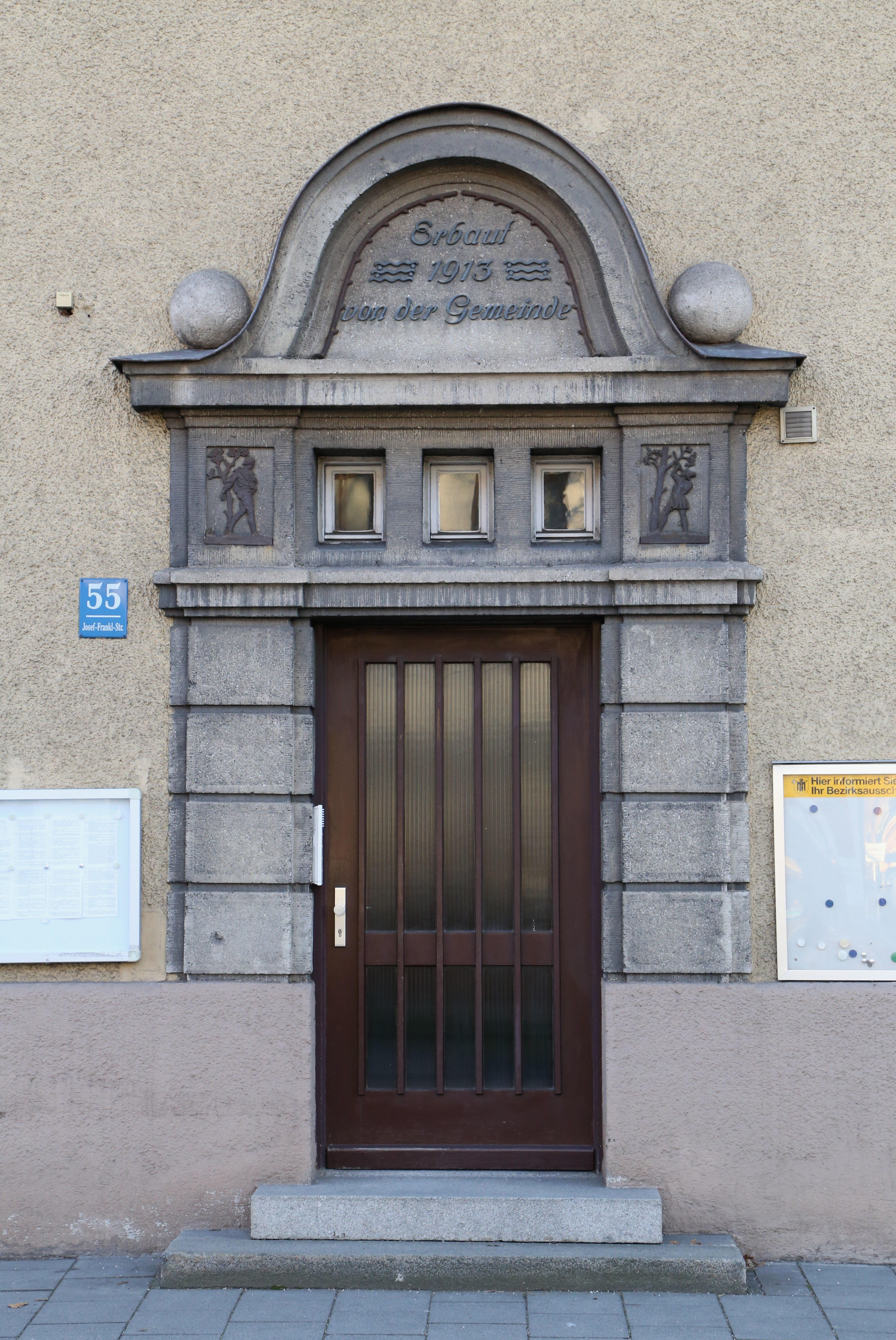 Josef-Frankl-Straße 55, Feldmoching, München; ehemaliges Rathaus von Feldmoching, zweigeschossiger historisierender Walmdachbau in Ecklage mit polygonalenen Eckerkern und steinernem Portal, bez. 1913.